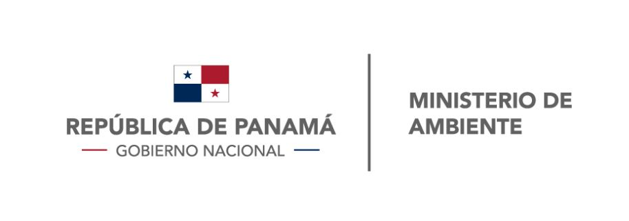 Logo del Ministerio de Ambiente de Panamá